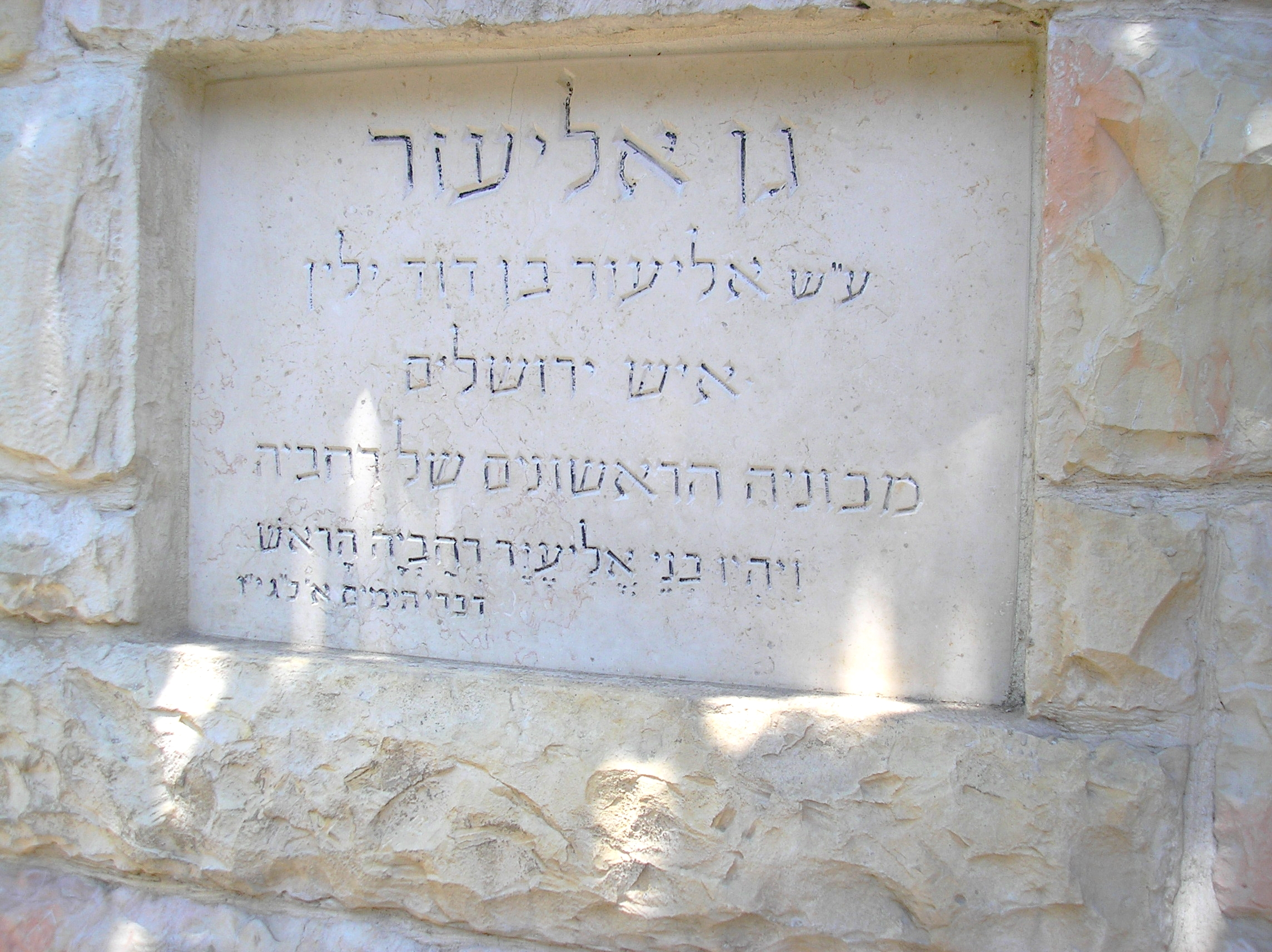 Gan Eliezer, Rehavia, Jerusalem